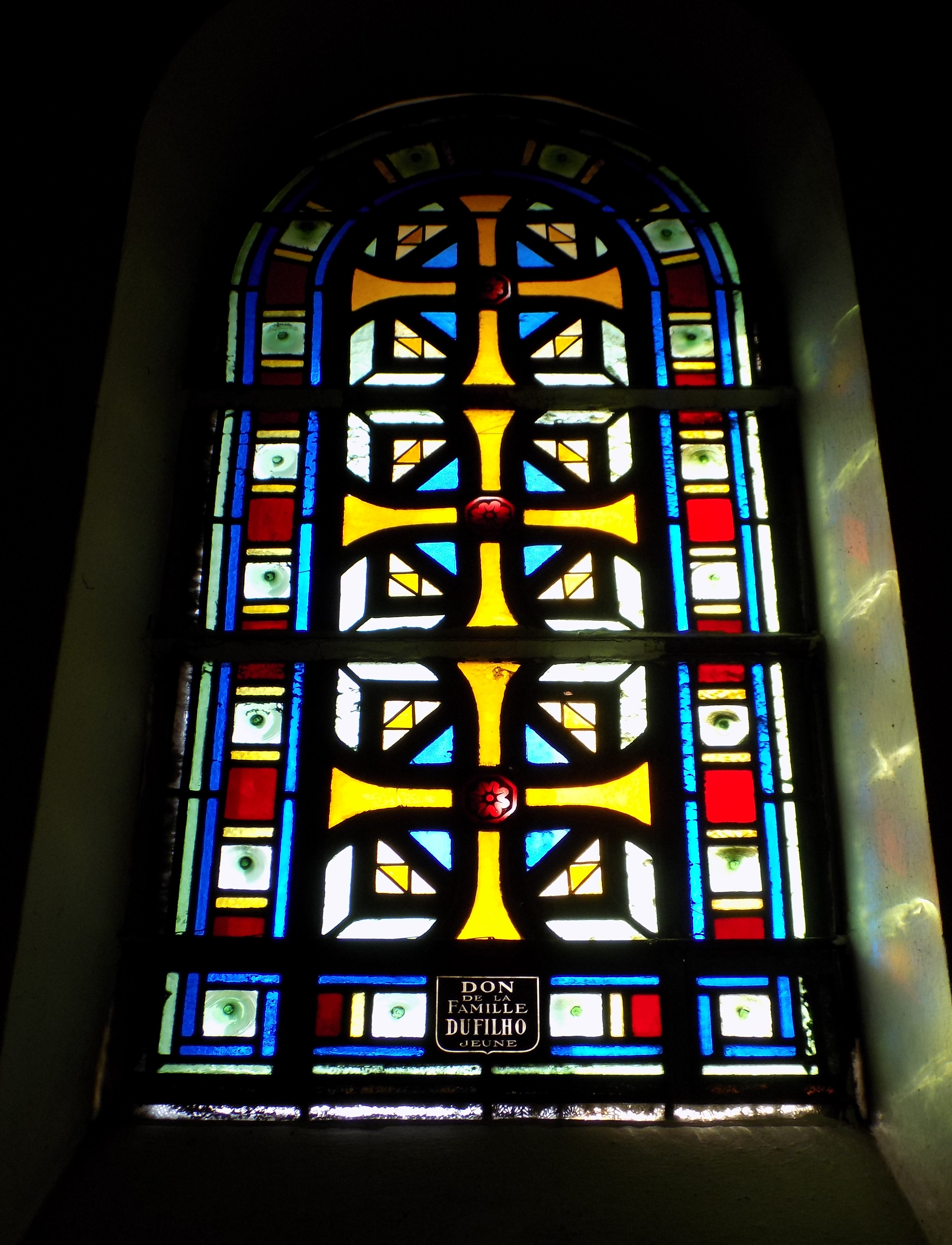 Un vitrail de l'église Sainte-Geneviève de Bordeaux, offert par la famille de l'acteur Jacques Dufilho.